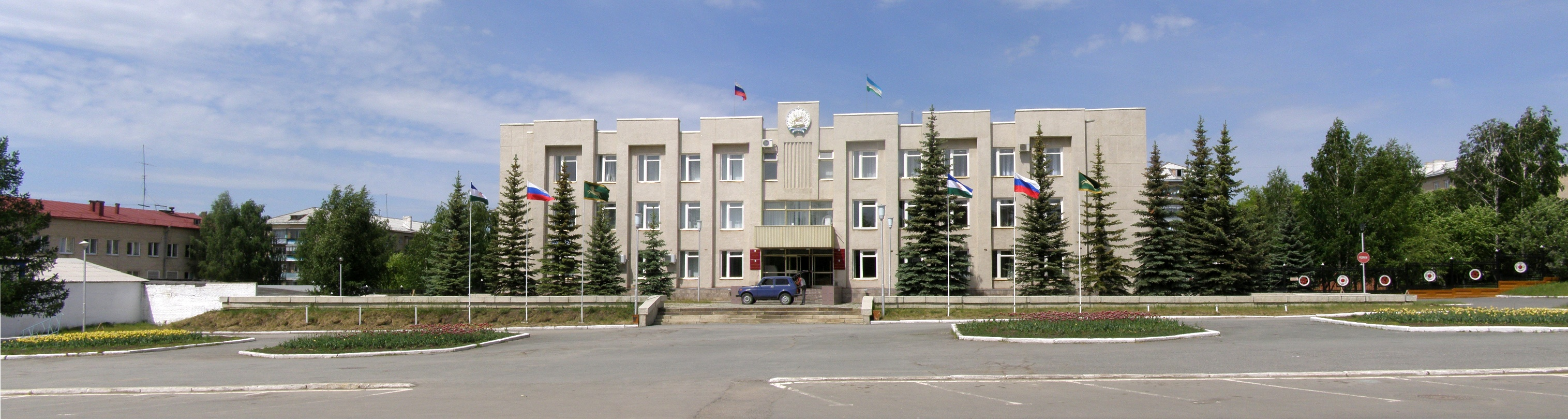 Здание администрации города Учалы